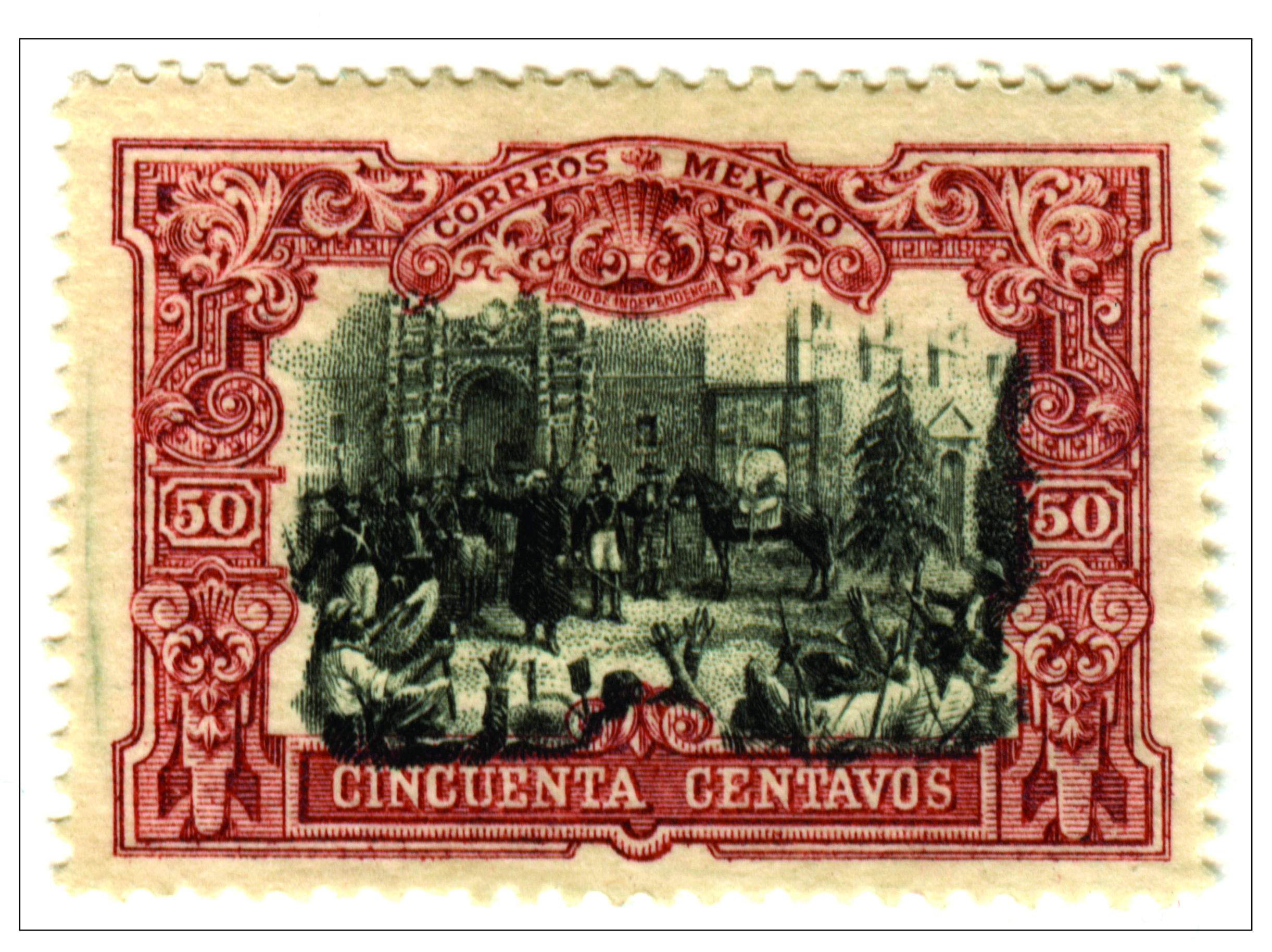 Estampilla de México, Centenario de la Independencia, fecha de primera emisión 1910, elaborada por Bradbury Wilkinson and Company, clasificada según el Catálogo Scott 2009 A44 Vol 4 pag. 895 y según el acervo filatélico Mexicano. Escaneado de un ejemplar de la colección filatélica de la familia Fonseca Padilla, Jalisco, México.